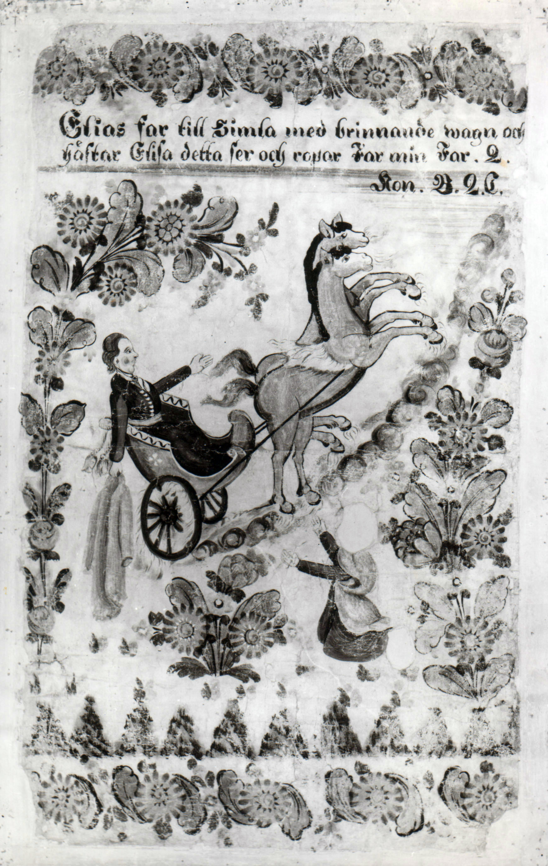 Elias far till Simla med brinnande wagn och hästar Elisa detta ser och ropar Far min Far. 2. Kon. B. 2. D.